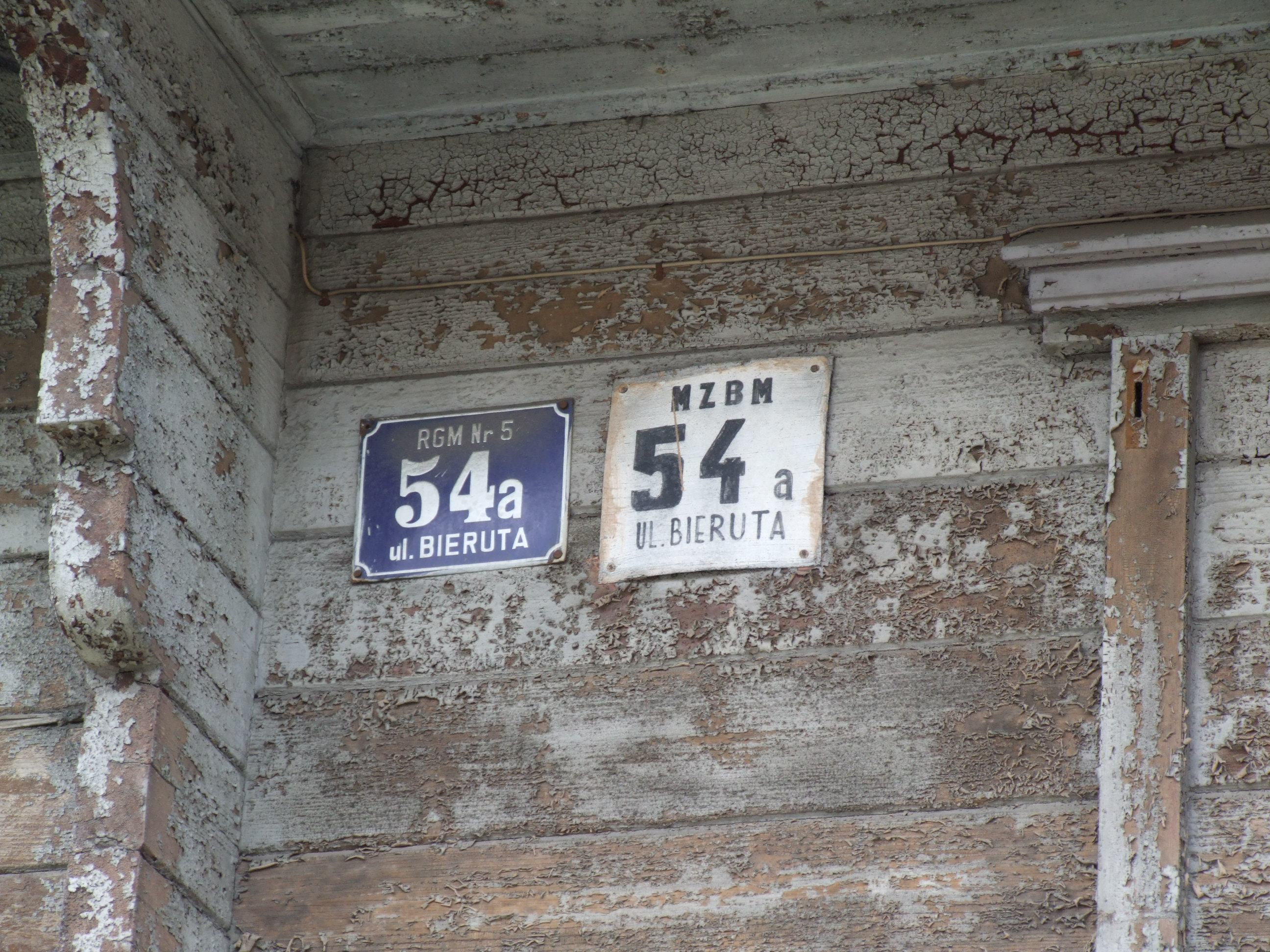 Bielawa - ulica Bieruta (obecnie Piastowska)